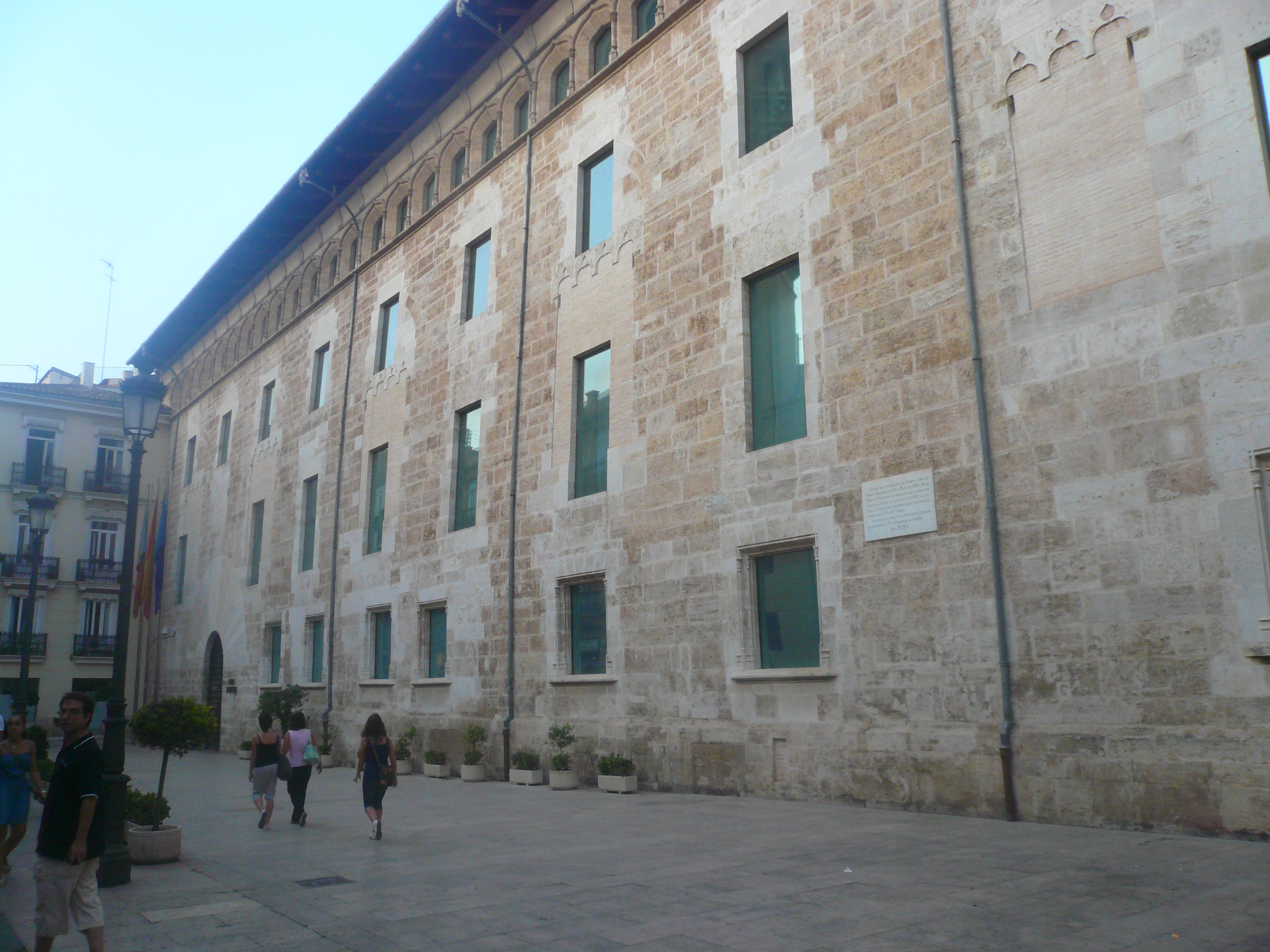 Palau de Benicarló (València) 15.250-132.